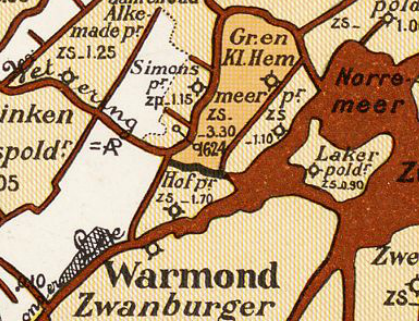 Hofpolder